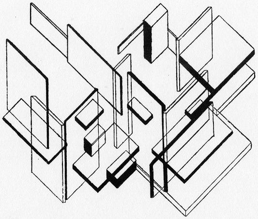 Theo van Doesburg. Architectural Analysis. 1923. Pencil and ink on transparent paper. 55 × 38 cm. Rotterdam, Netherlands Architecture Institute.